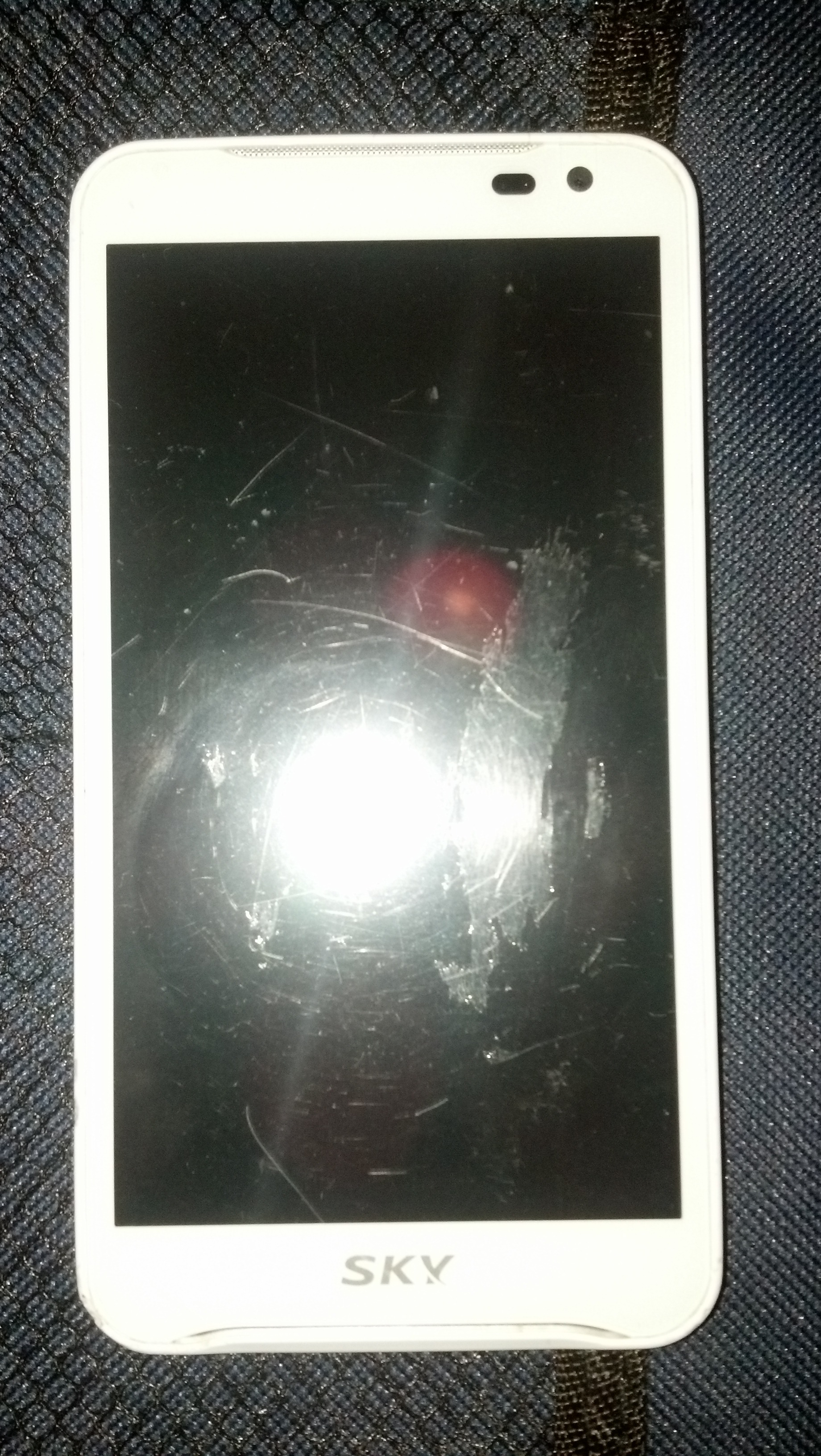 팬택 베가레이서 2